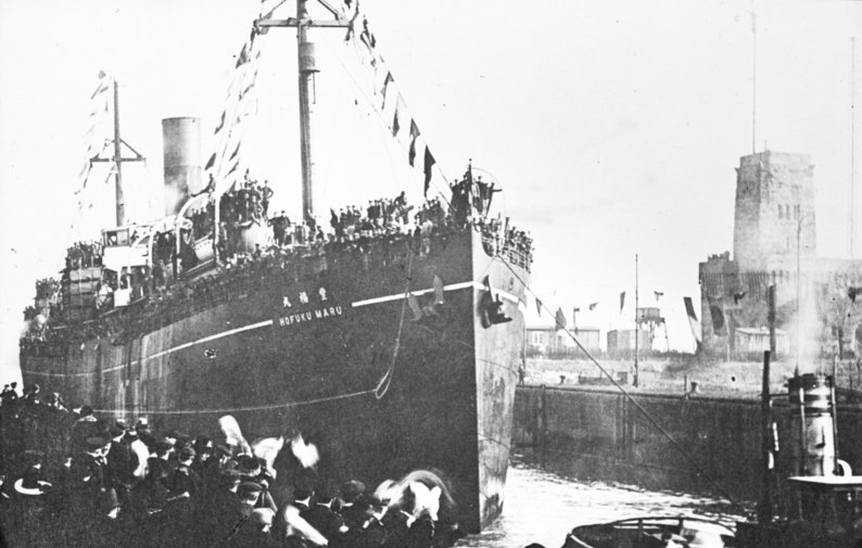 Wilhelmshaven, Rückkehr von Kriegsgefangenen aus Tsingtau China, Tsingtau Ankunft der ersten Kriegsgefangenen aus Japan in Wilhelmshaven Februar 1920. [Einlaufen des Schiffs "Hofuku Maru" im Hafen von Wilhelmshaven]